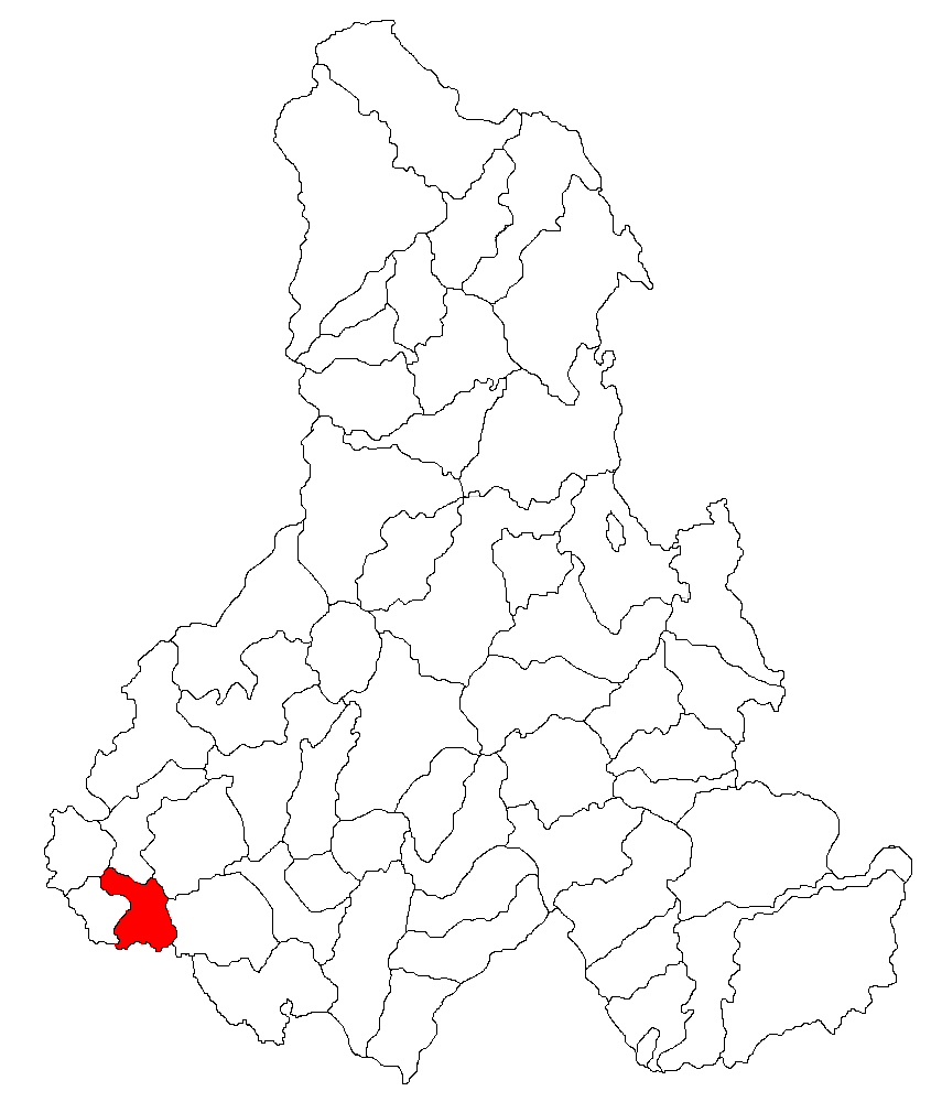 Categorie:Hărţi ale judeţului Harghita